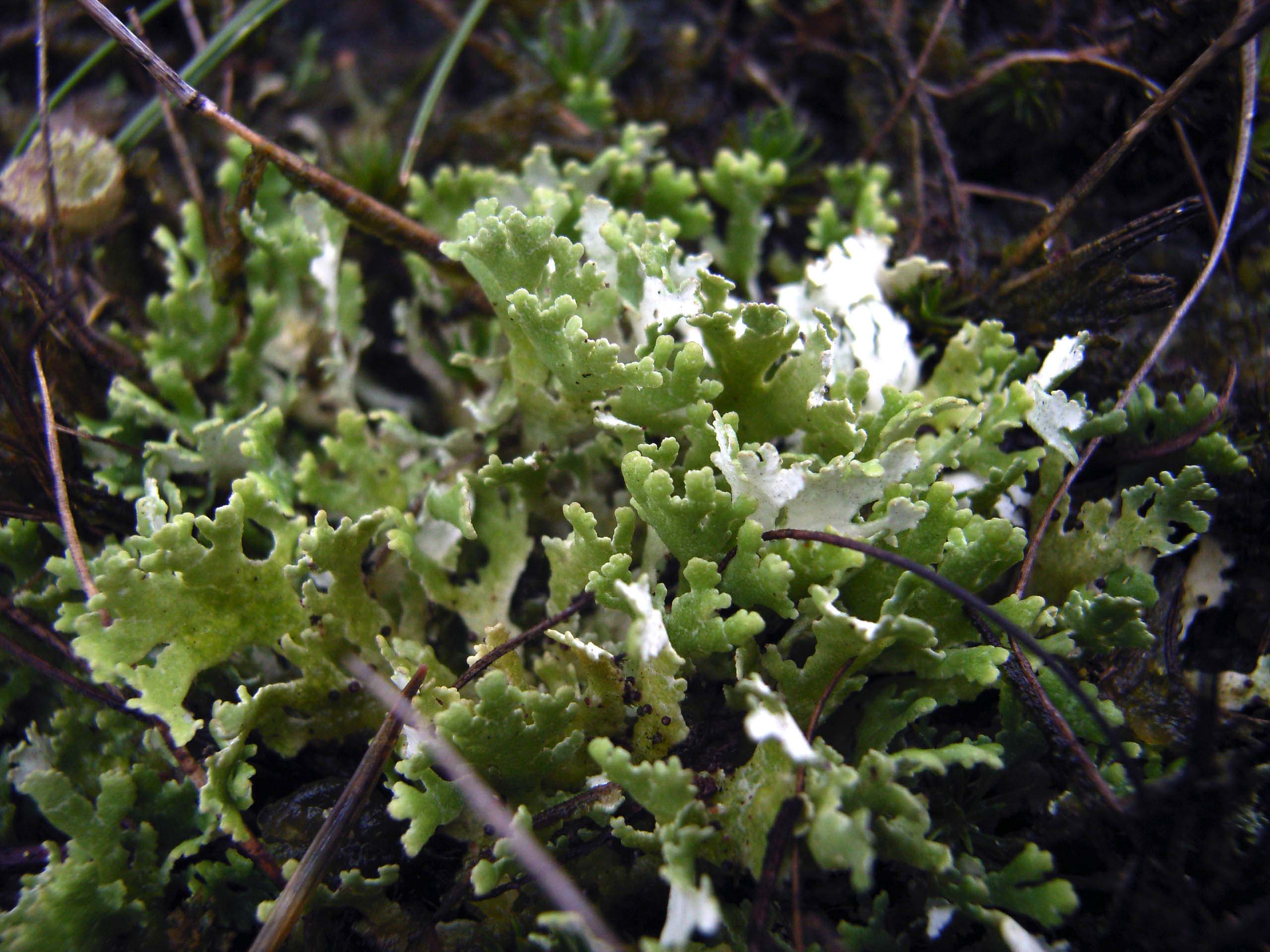 Blättrige Cladonie (Cladonia foliacea), Binnendüne in Nordwestdeutschland